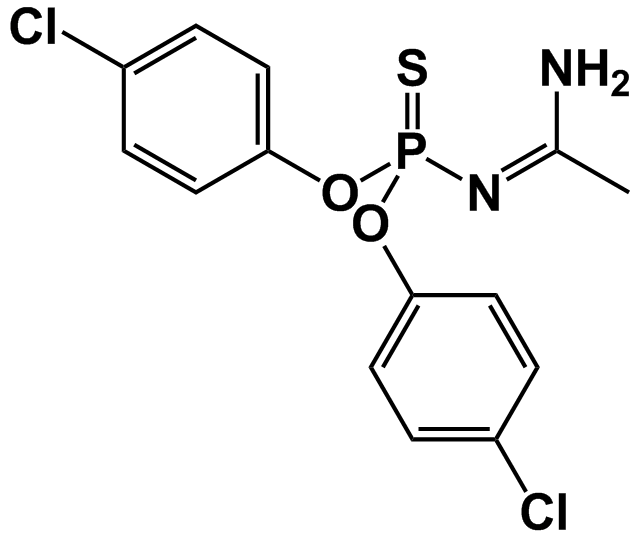 Fosacetím, organofosforový rodenticíd.